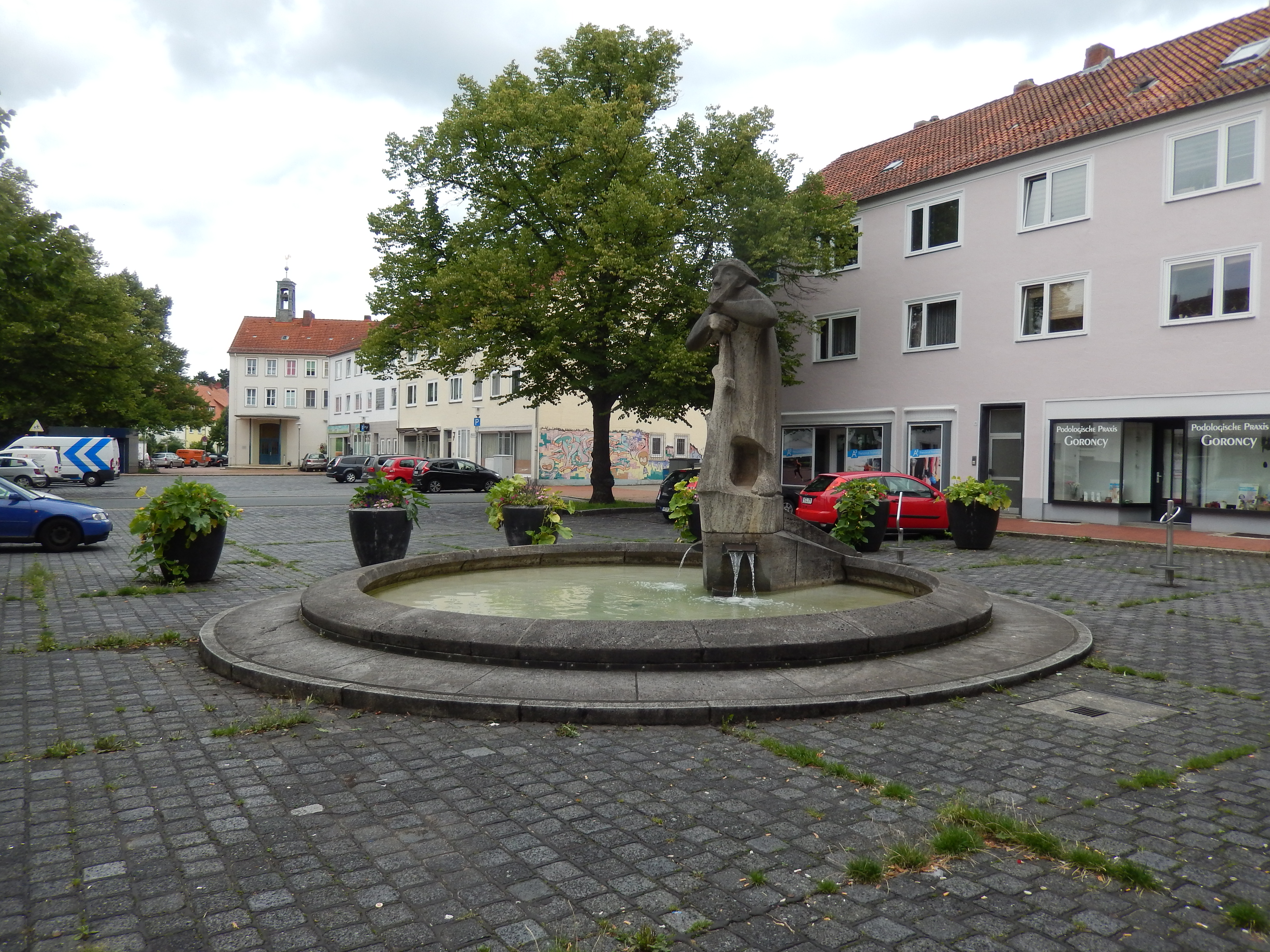 Rübezahlbrunnen in Hannover-Mittelfeld